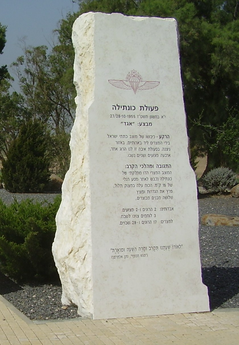 Kuntila האנדרטה לזכר מבצע כונתילה